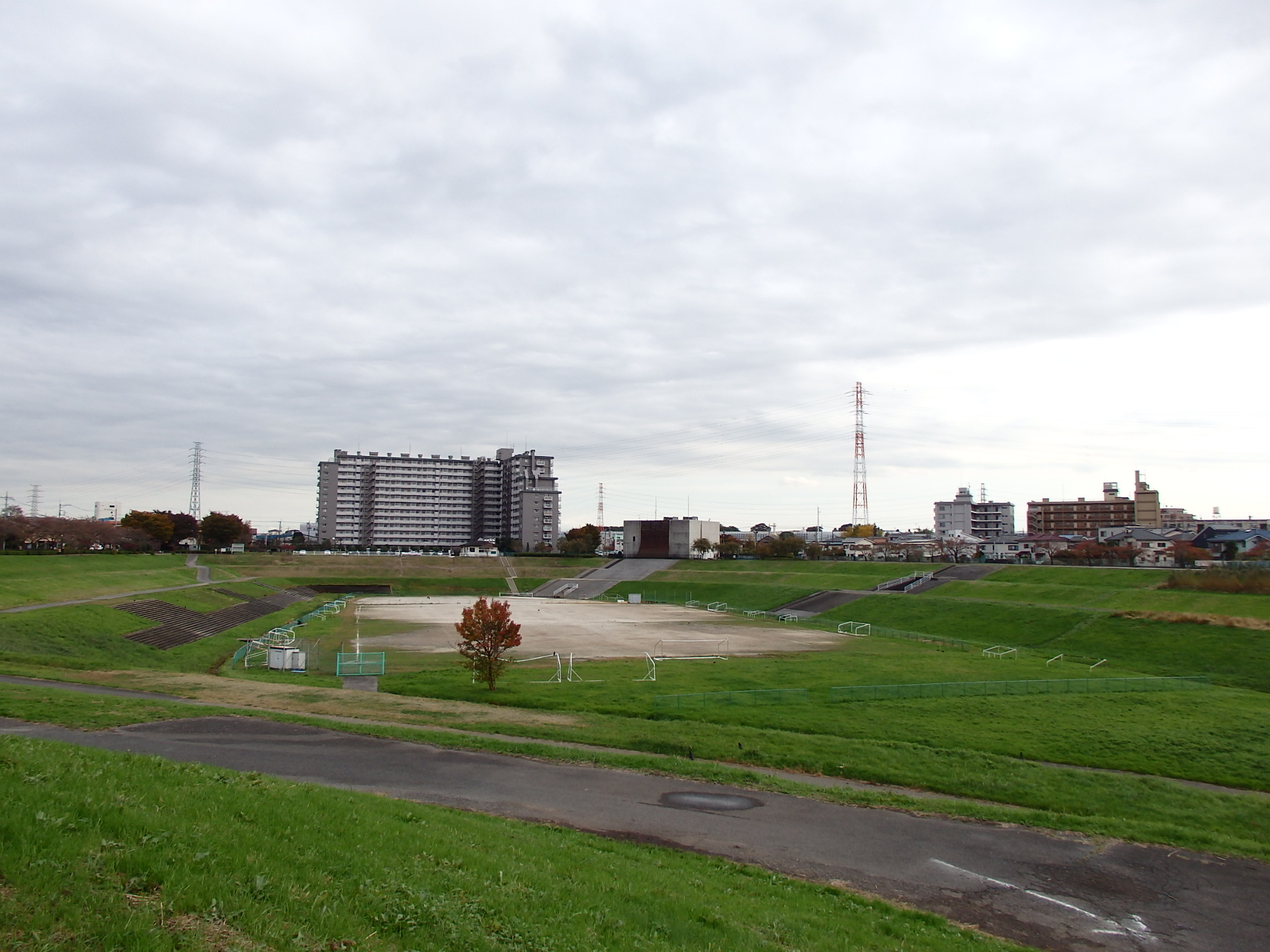 上谷沼調節池南側